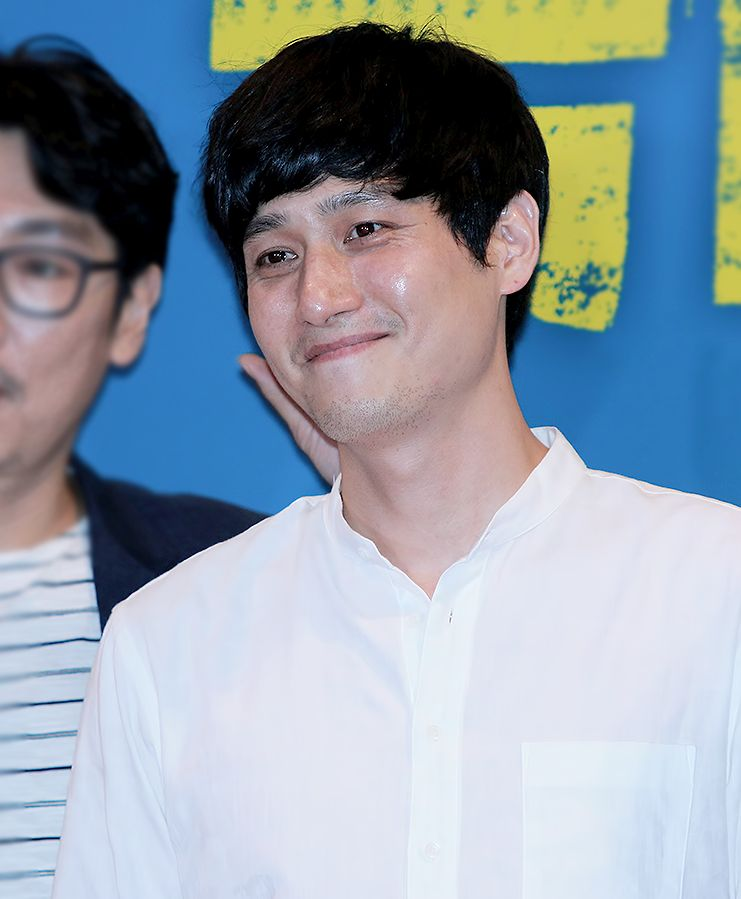 2015.06.16 電影《絕密搜查》VIP優先場-朴海俊